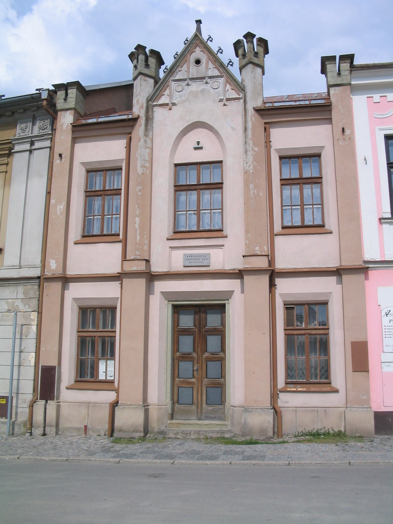 Bývalá synagoga na Šubrtově náměstí v Dobrušce (ČR), dnes modlitebna Klášterského sboru ČCE